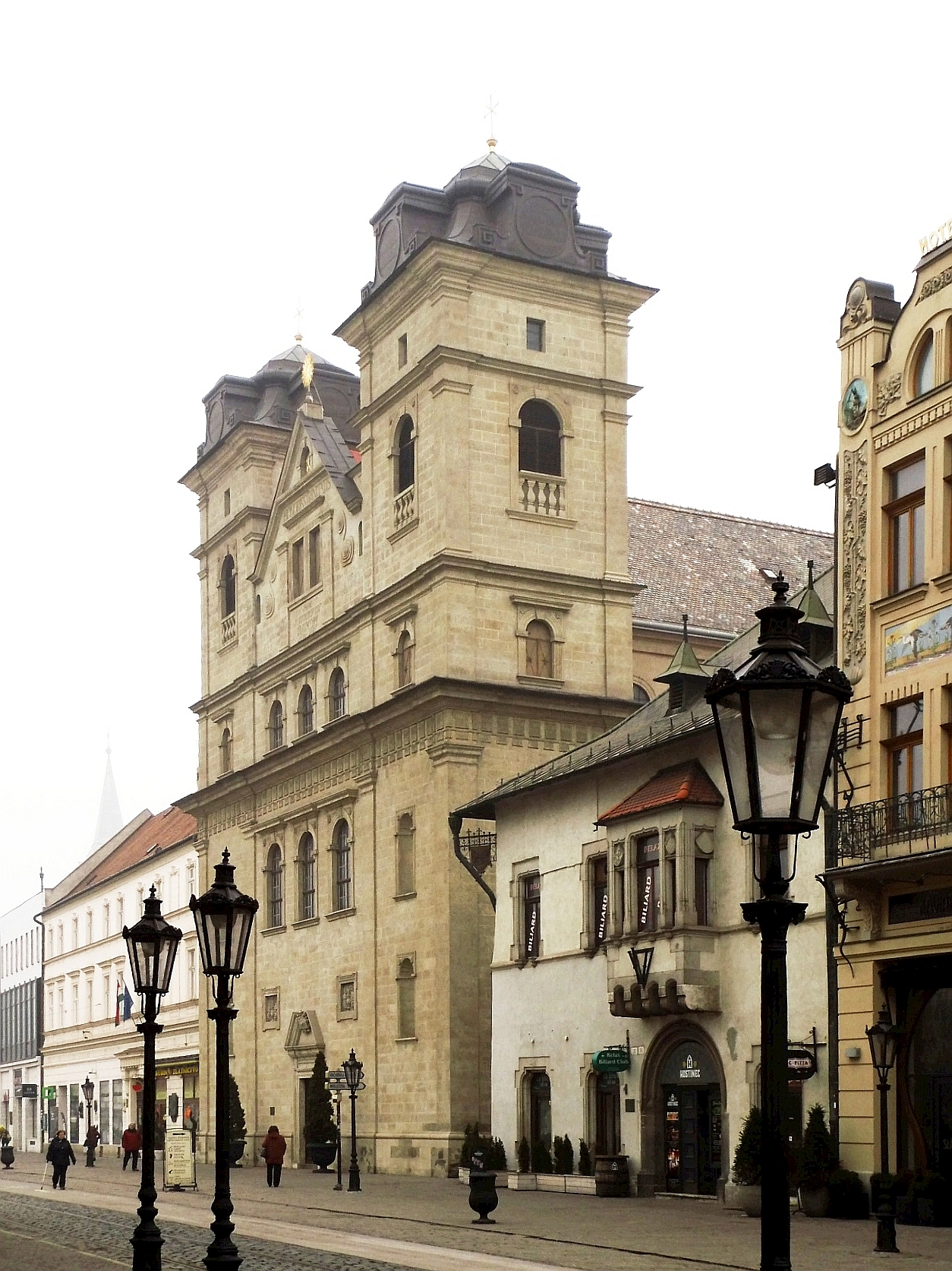 Kerk van de Heilige Drievuldigheid (Kosice) (Slowakije) - Gevel (rechts)